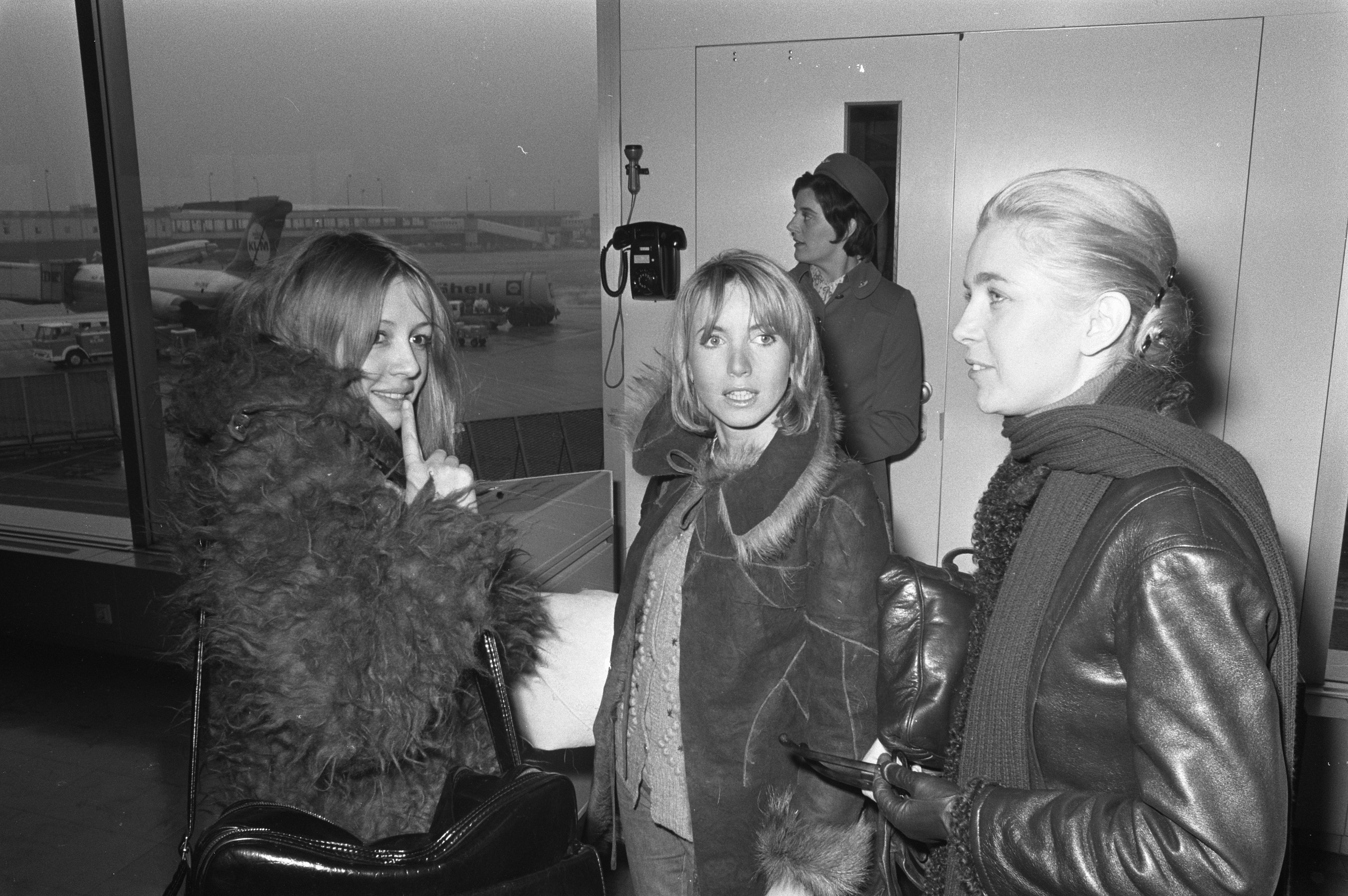 Franse actrices voor Cinemanifestatie op Schiphol v.l.n.r Juliet Berto, Bulle Ogier en Marie Dubois. ANEFO 925-3550